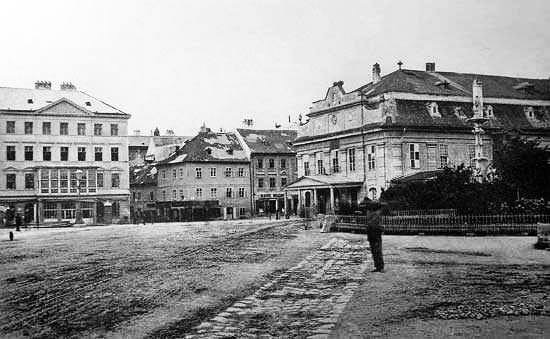 Die Promenade vor 1884; links das Kern'sche Haus, rechts die St. Josephs-Säule